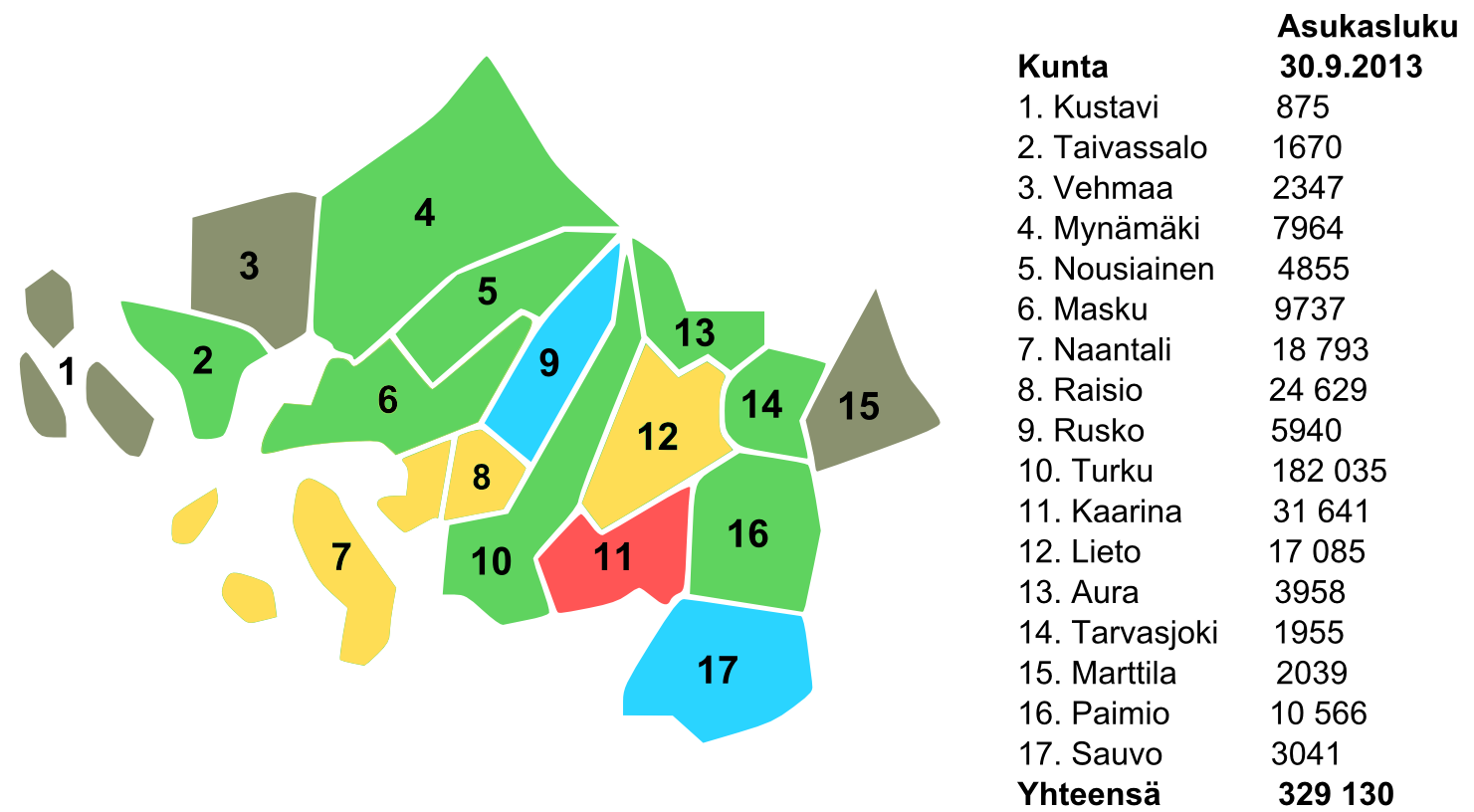 suomi (fi): Turun kaupunkiseudun kuntajakoselvitys Kuntajakoselvityksen status Kunta halukas osallistumaan kuntajakoselvitykseen Kunta jättänyt asian toistaiseksi pöydälle Kunta ei ole vielä käsitellyt asiaa Kunta voi halutessaan osallistua selvitykseen vapaaehtoisesti Kunta kieltäytynyt kuntajakoselvitykseen osallistumisesta